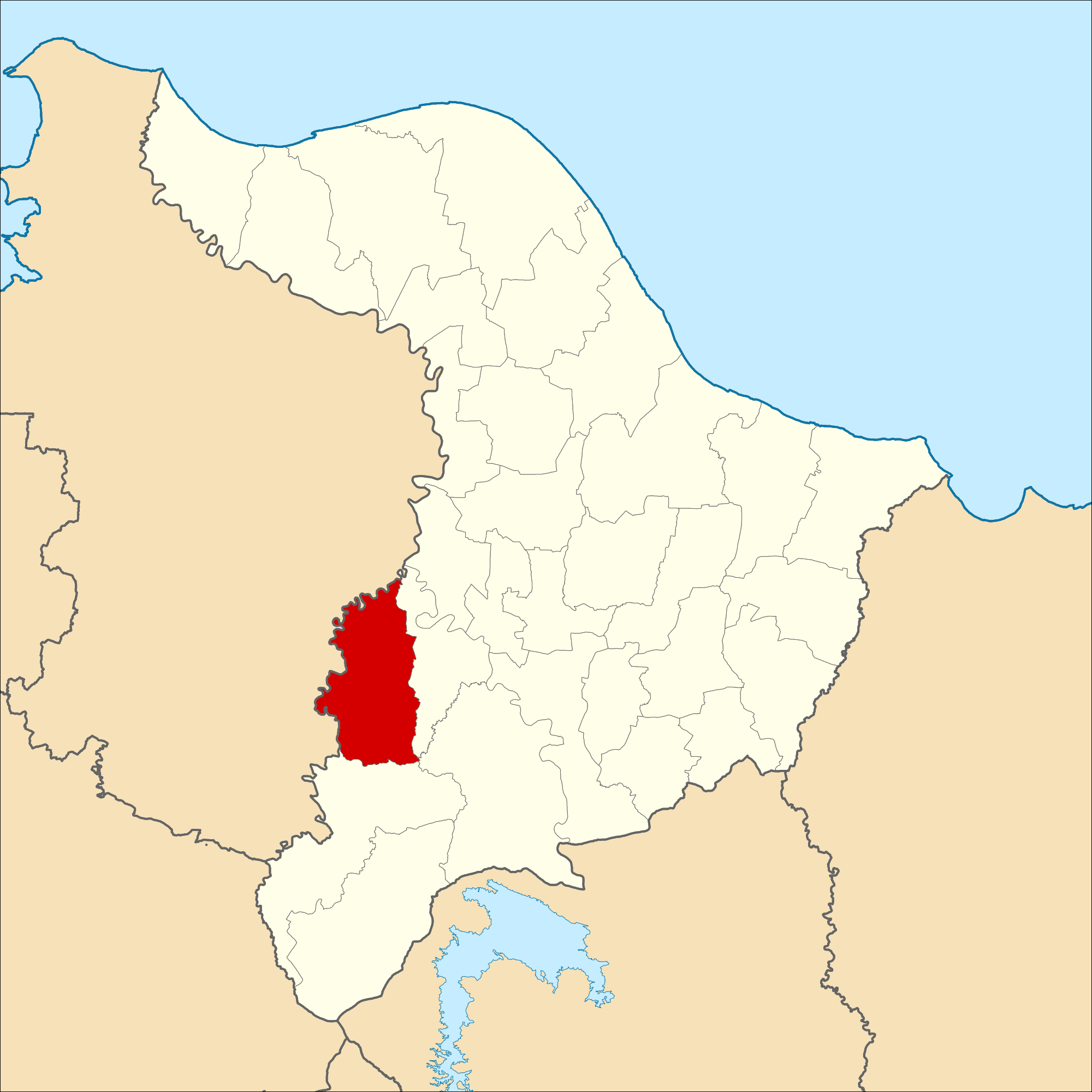 Peta Lokasi Kecamatan Telukjambe Barat, Kabupaten Karawang, Indonesia